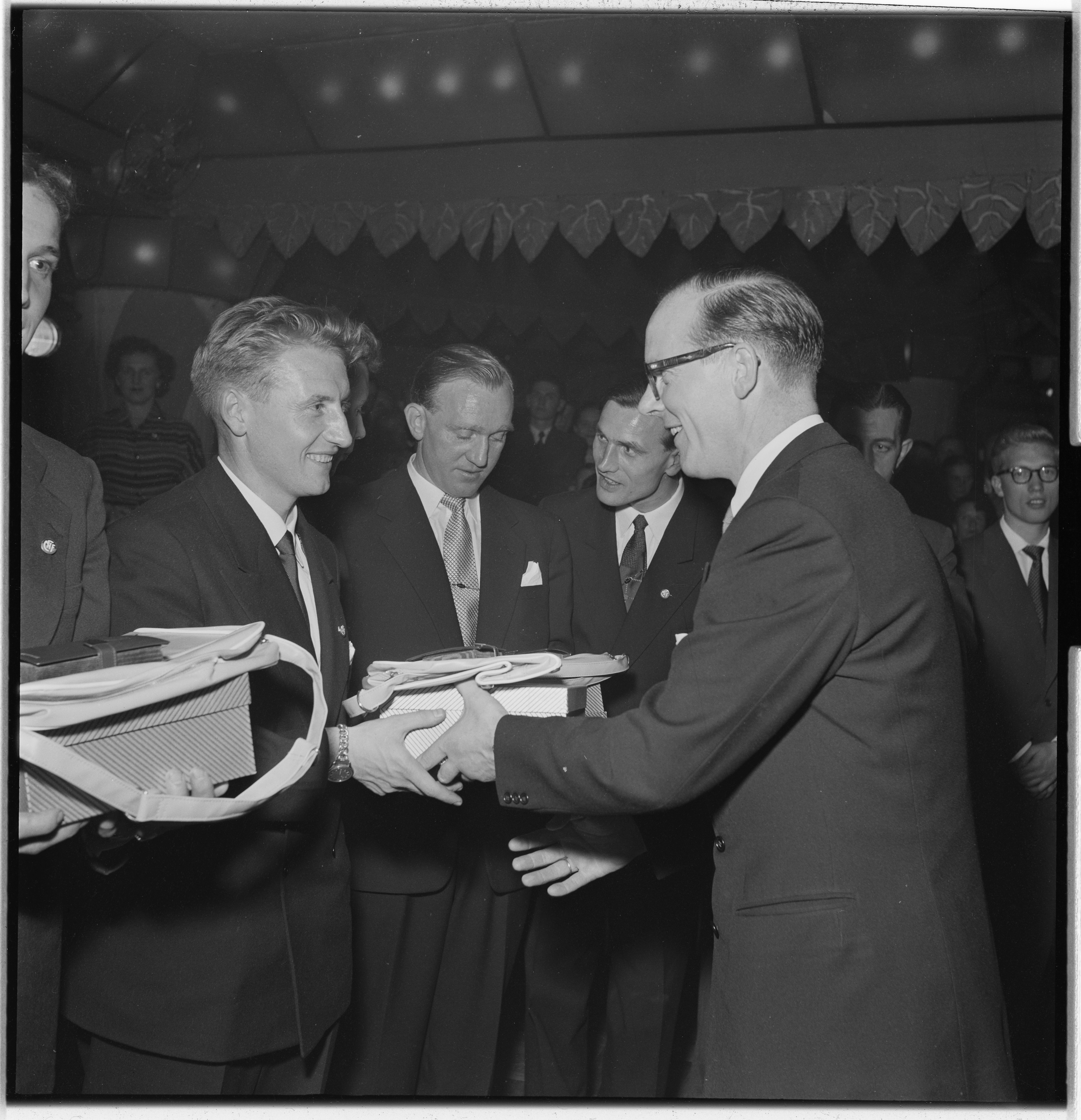 Bildet er hentet fra Arkivverket. Cupfinale Ullevål, Skeid-Lillestrøm Arkivinstitusjon : Riksarkivet Arkivnavn : Billedbladet NÅ Sted : Norge, Oslo, Oslo, Emneord: fotball, fotballkamp, cupfinale, pauseunderholdning Avbildet